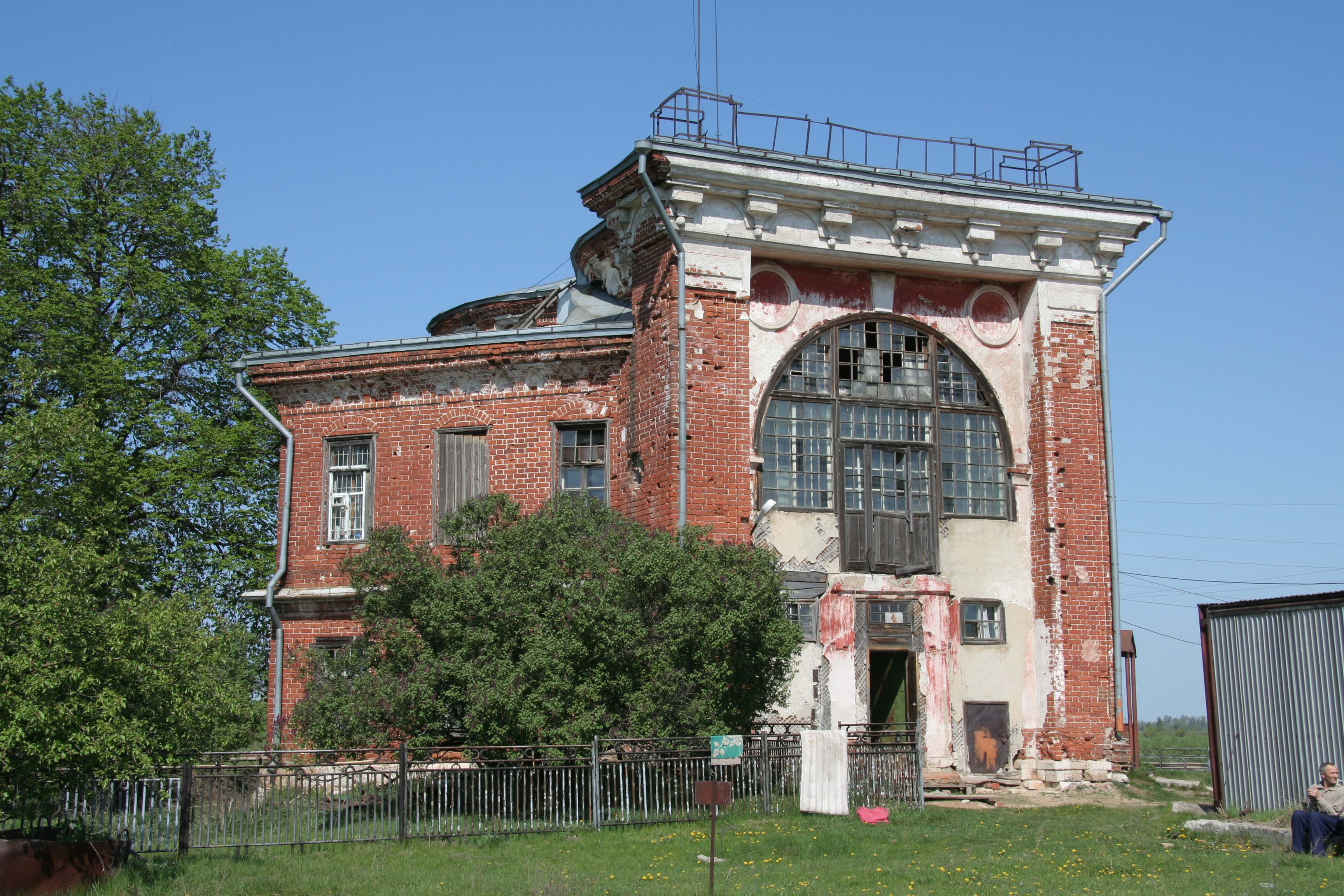 Досчатое, Охотничий домик Баташевых